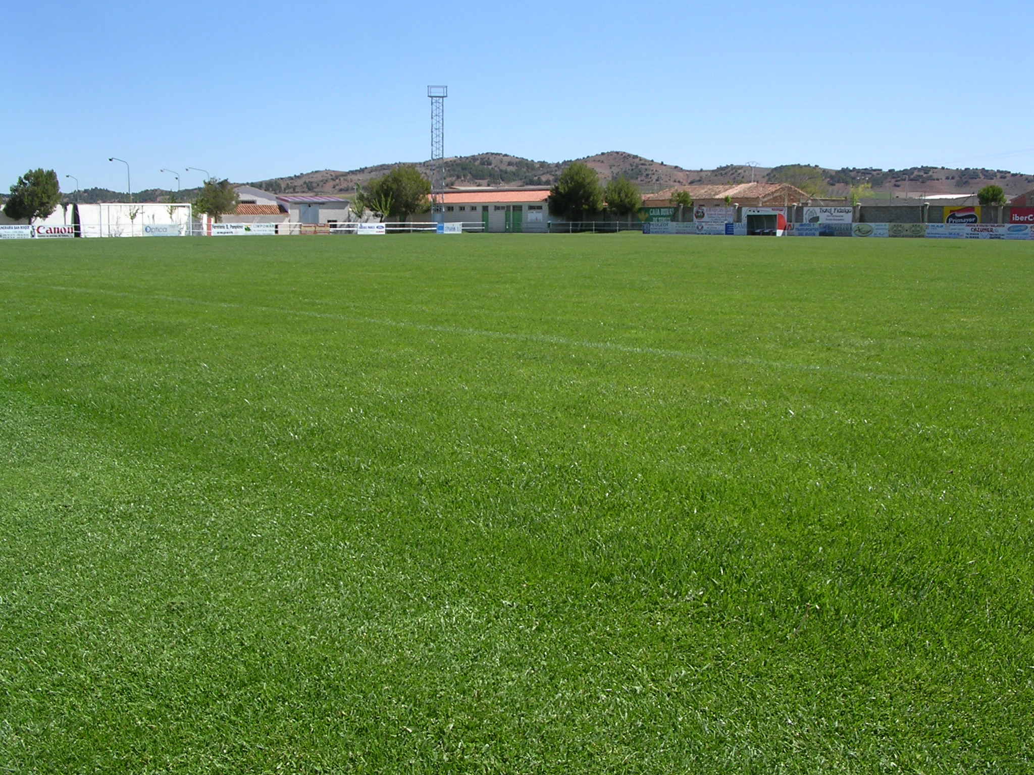 Campo de futbol Calamocha